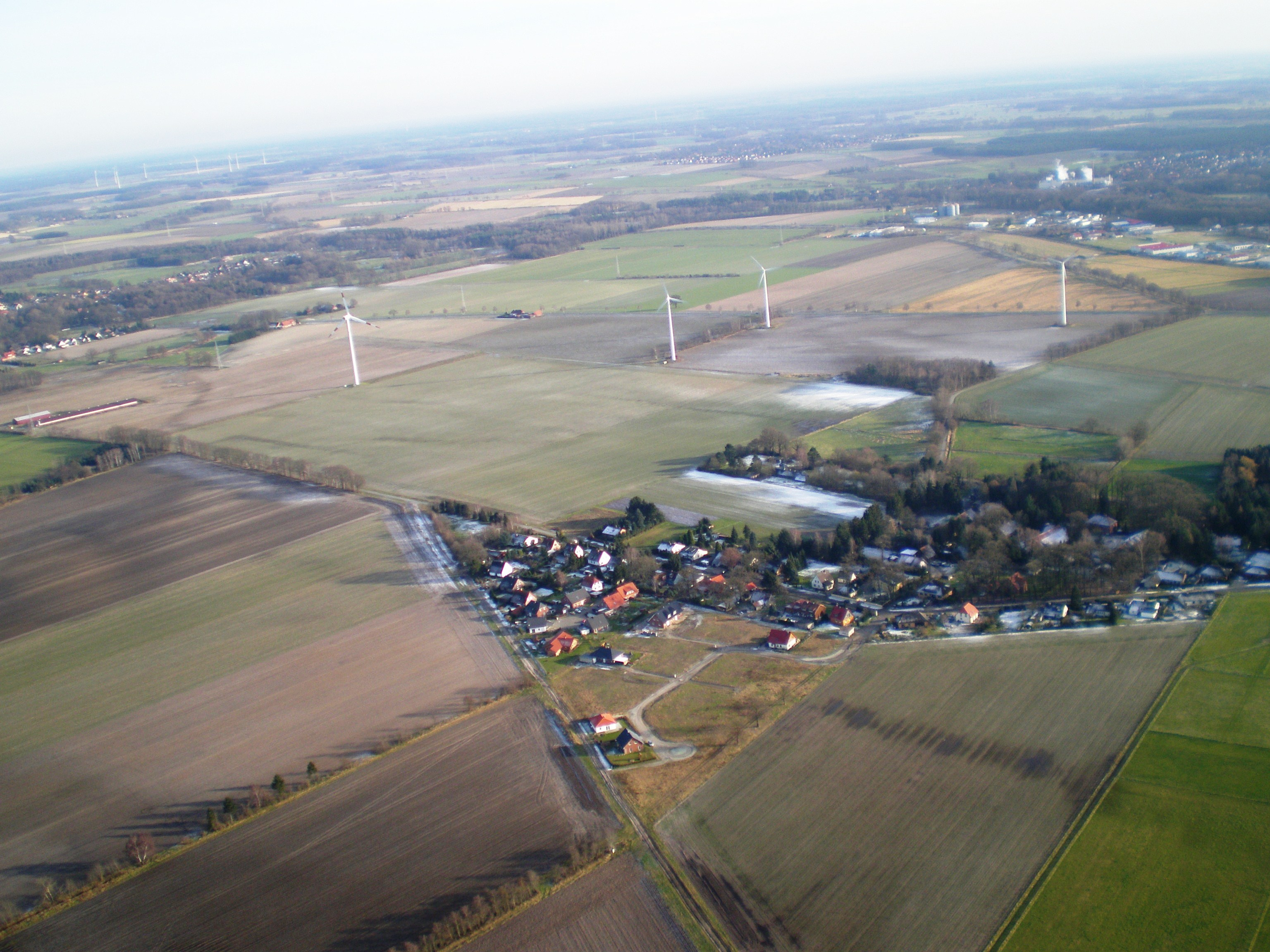 Luftbild Gockenholzer Oberdorf